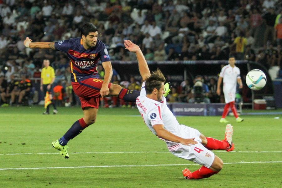 Матч за Суперкубок УЄФА 2015 року у Тбілісі. Грузія